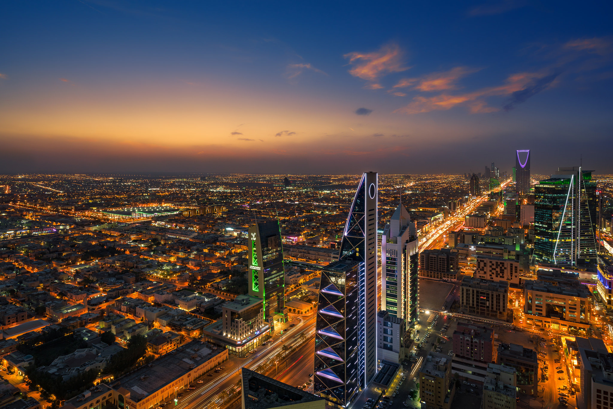 Riyadh, Saudi Arabia [2048x1367]